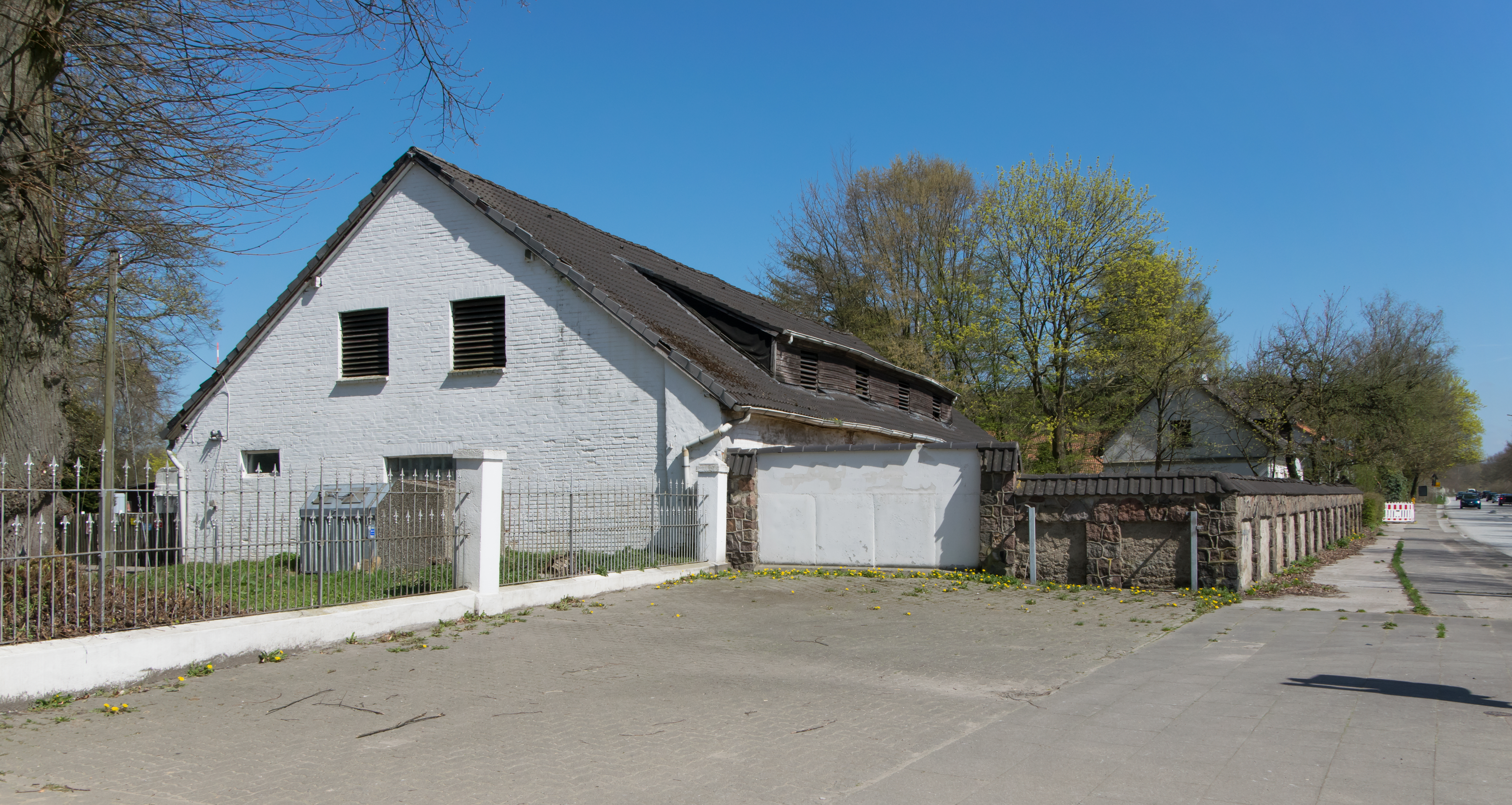 Herrenhaus Höltigbaum Nebengebäude